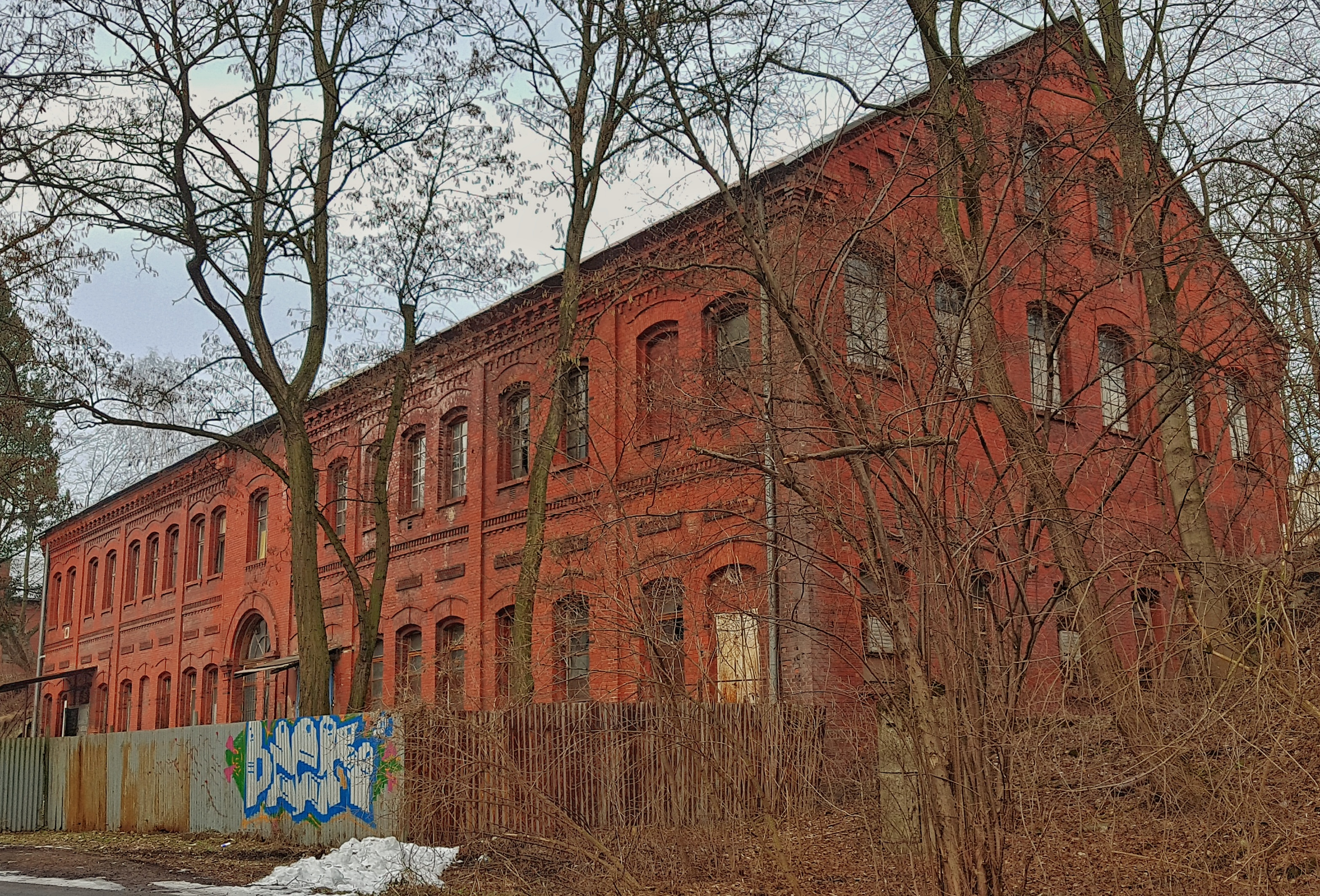 Důl Oskar